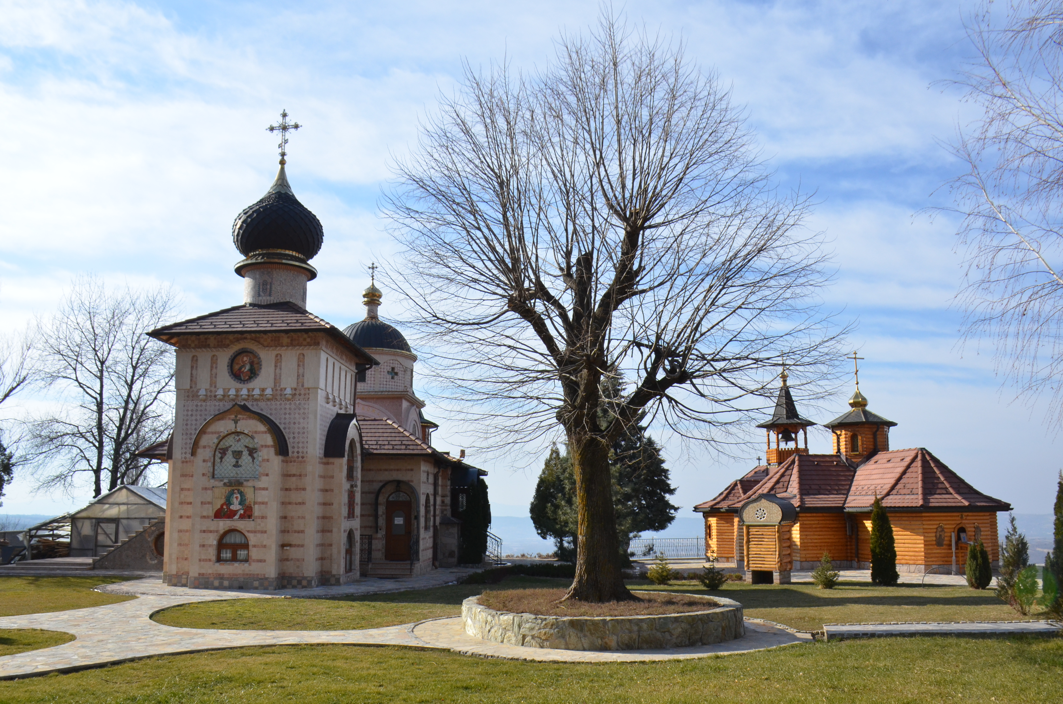 Манастир Покров Пресвете Богородице, село Лешје, Општина Параћин, Поморавски округ